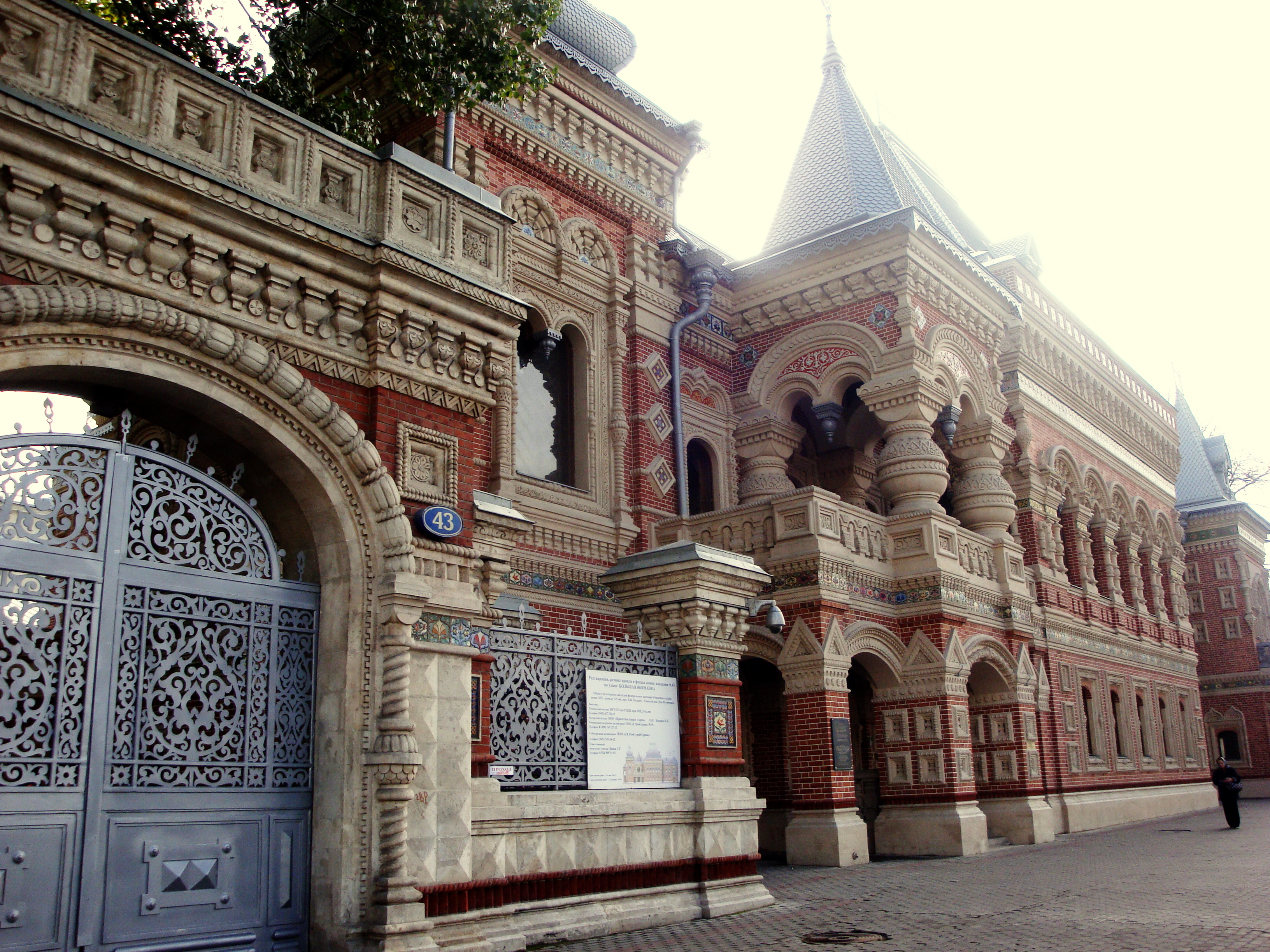 Усадьба Игумнова Н. В. (Москва и Московская область, Москва, Большая Якиманка улица, 43)